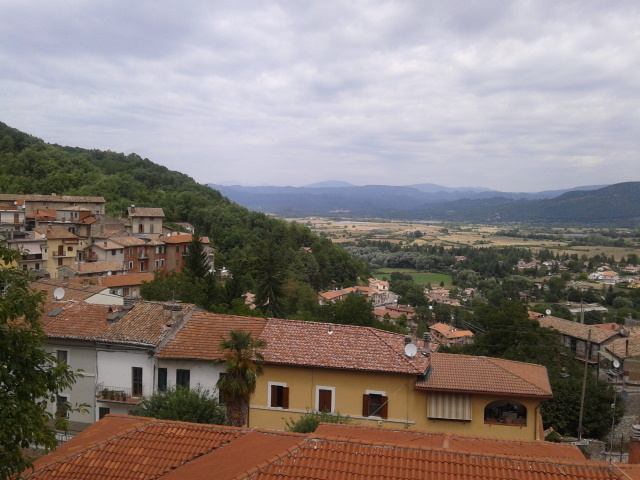 Foto panoramica da Rocca di Botte